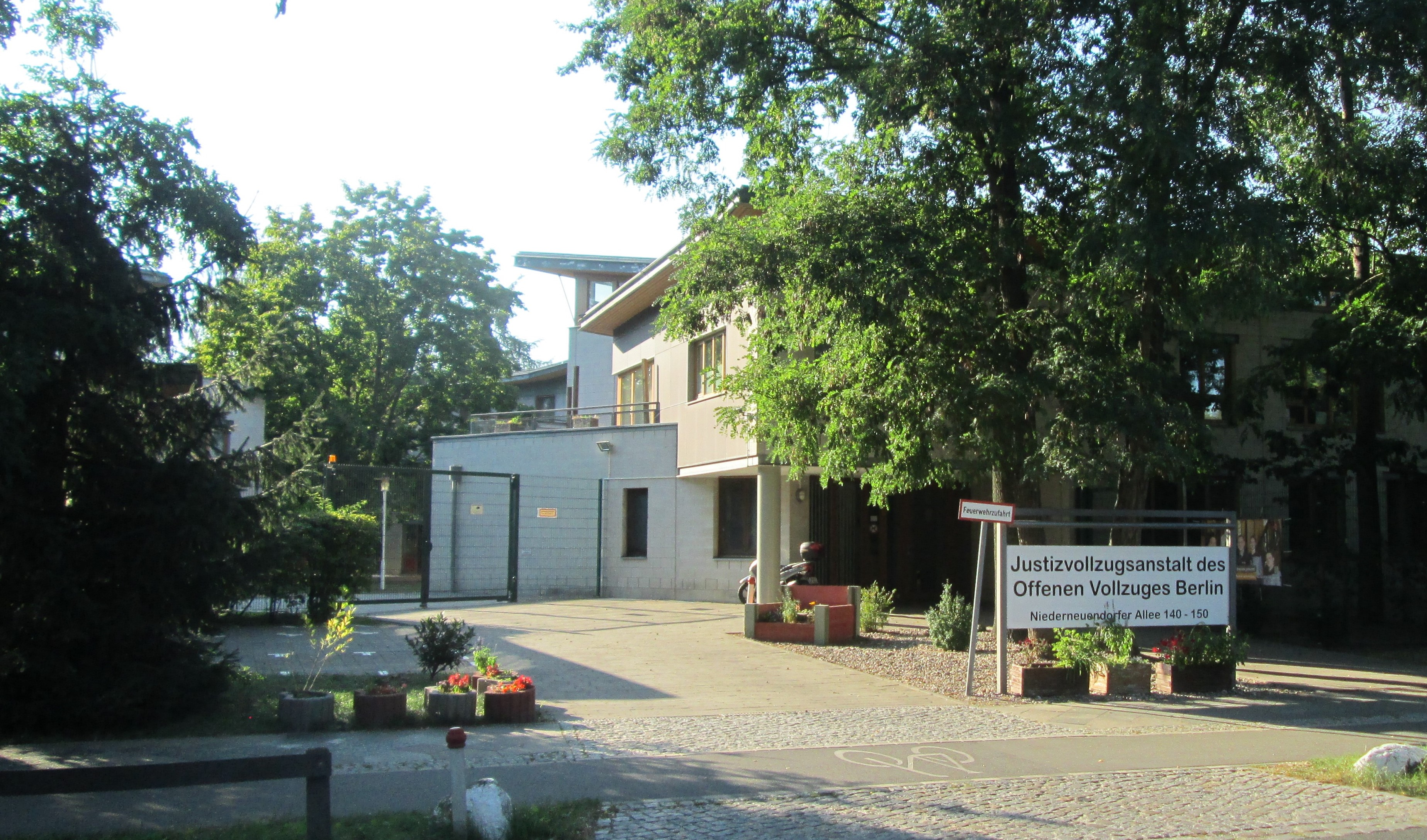 Justizvollzugsanstalt Berlin-Hakenfelde, Eingang